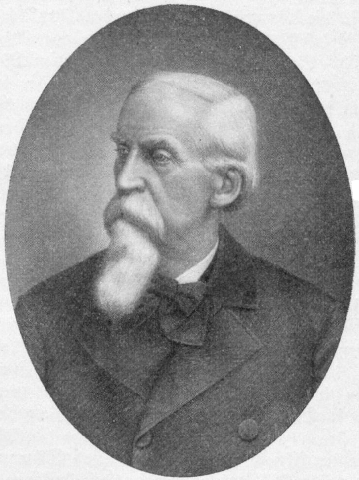 Porträt von Georg Schöttle (1823–1897), Stuttgarter Unternehmer und Gründer der Stuttgarter Pferdeeisenbahn, dem Vorläufer der Stuttgarter Straßenbahnen.